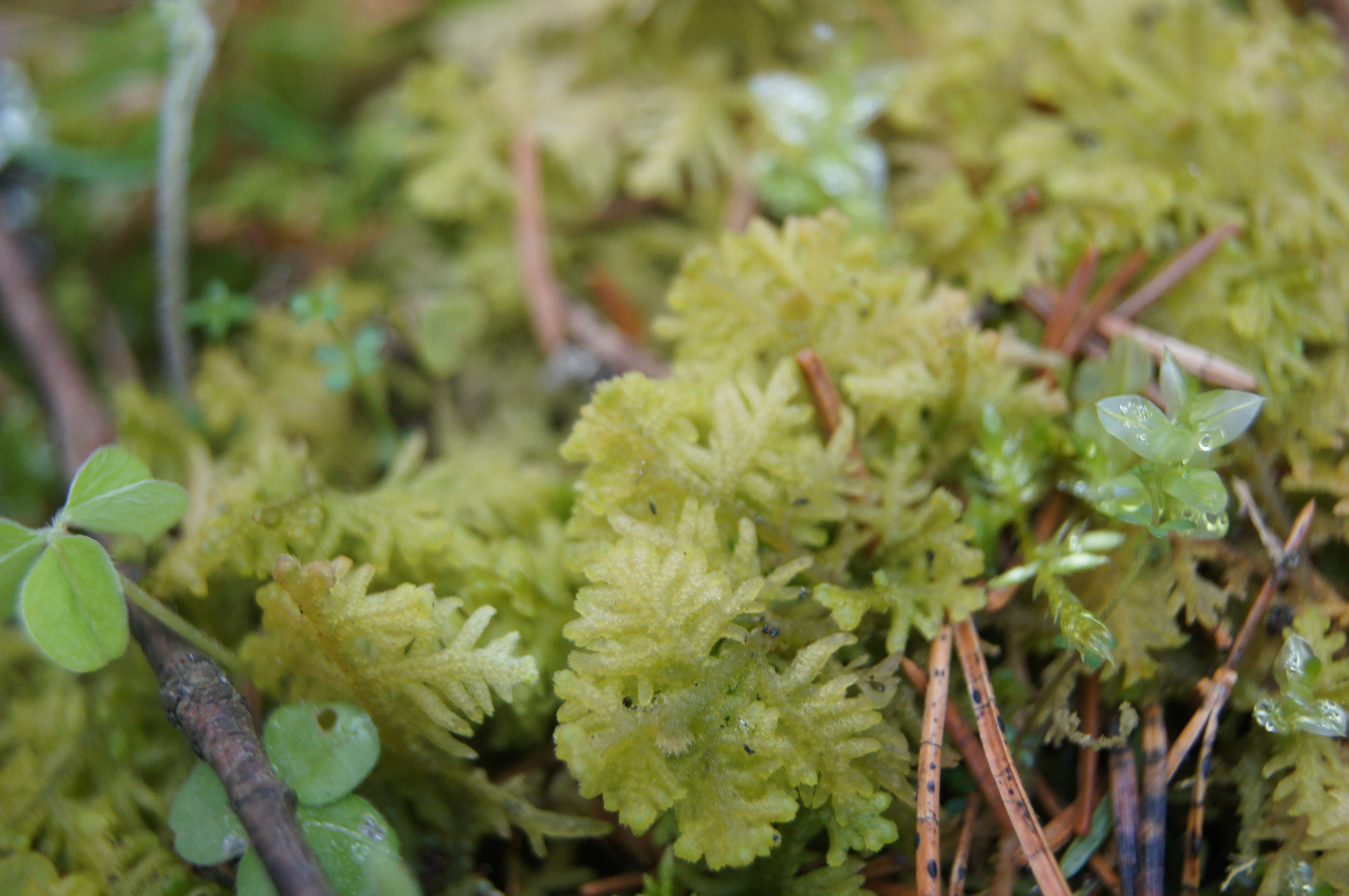 Pūkuotoji apuokė (Trichocolea tomentella) Punios šile